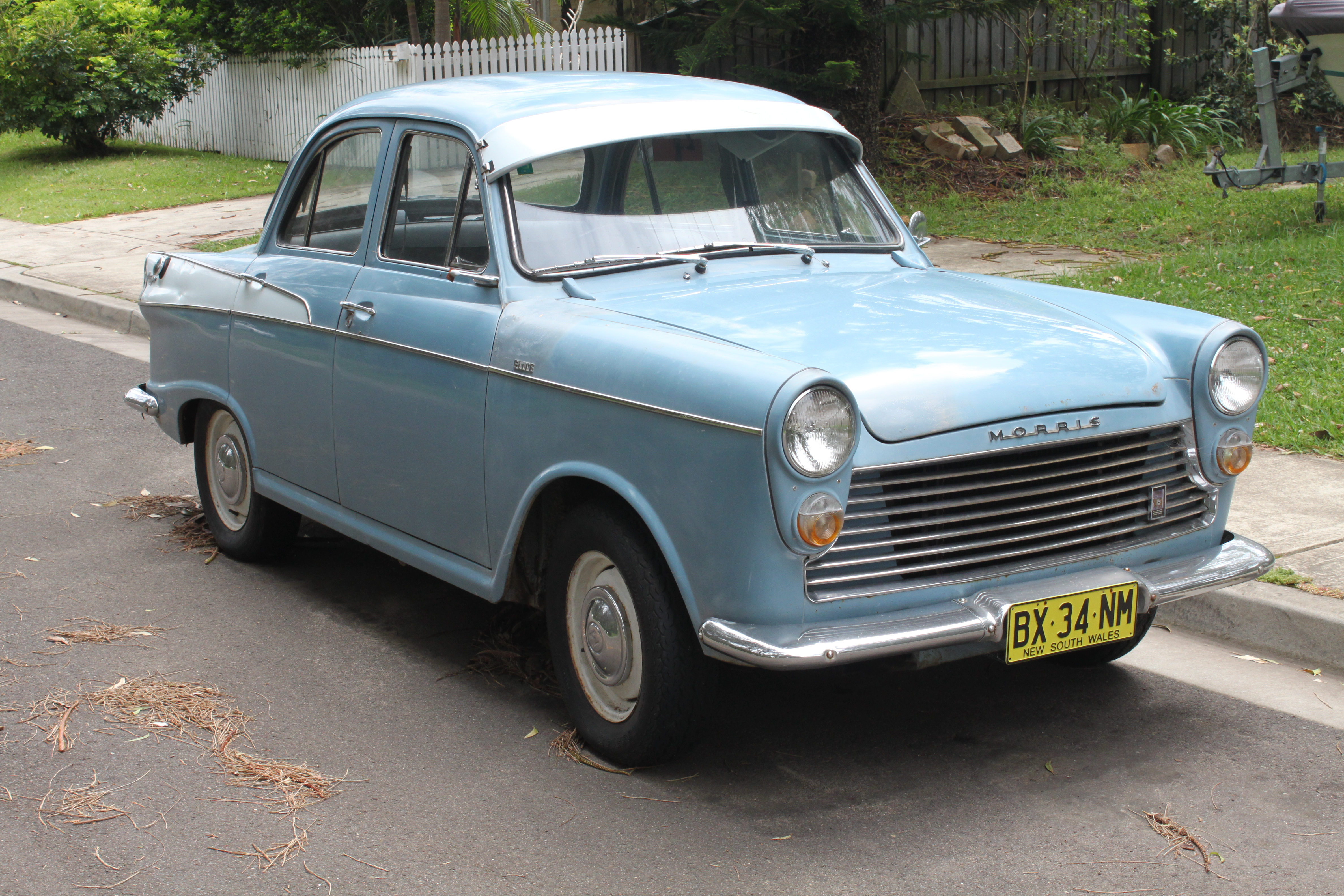 Morris Major Elite